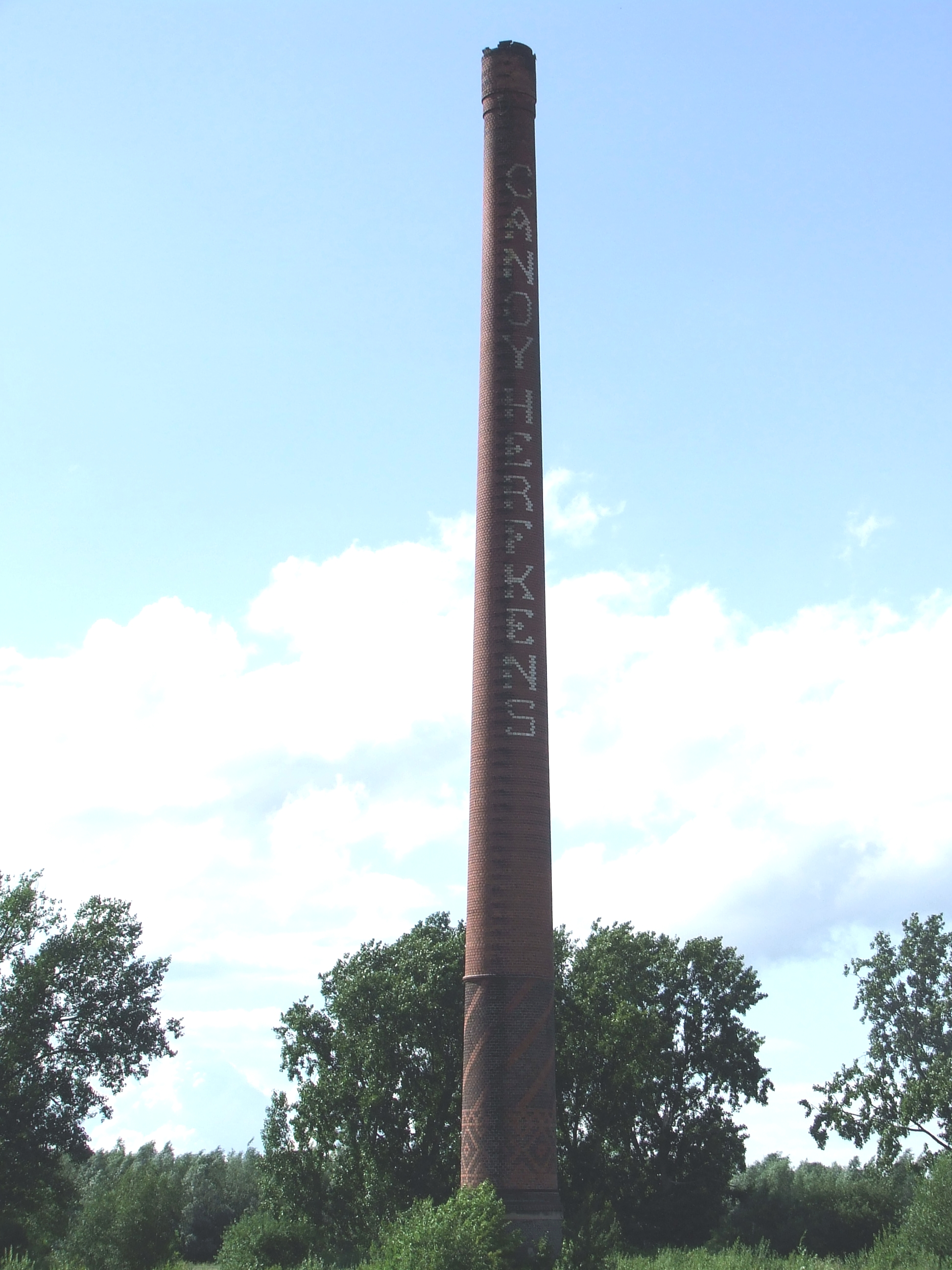 Foto van schoorsteen van de verdwenen baksteenfabriek Canoy-Herfkens in Tegelen